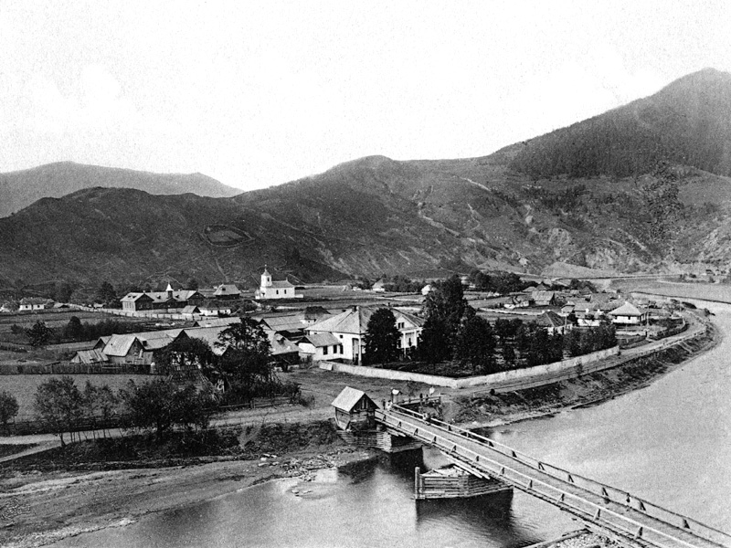 Broşteni